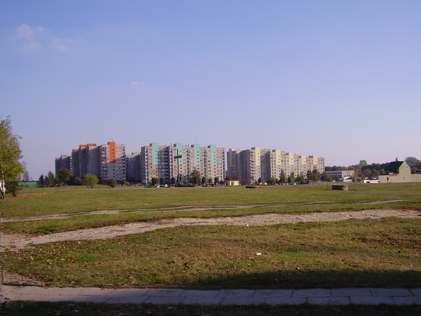 Plac Papieski przy ul. Gwiezdnej w Sosnowcu